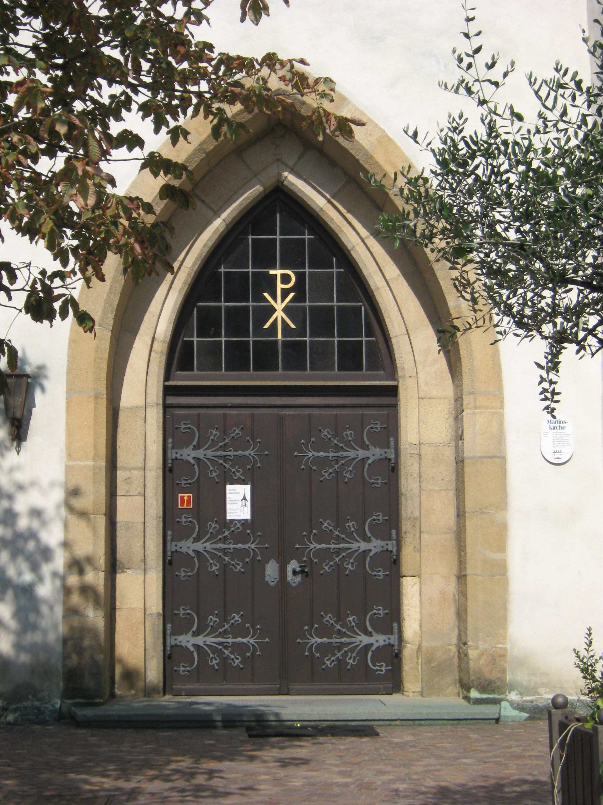 Turmportal. Die Martinskirche in Pfullingen ist die Urkirche des Pfullichgaus. Um 620 als Holzkirche, um 760 als karolingische Steinkirche und um 930 als frühromanische Kirche mit kreuzförmigem Grundriss umgebaut. Die dreischiffige staufische Säulenbasilika wurde 1150 errichtet, der spätgozische Chor 1463. Das Langhaus wurde 1579 modernisiert und das barocke obere Turmgeschoß mit achtseitgem Spitzhelm 1773 aufgesetzt. 1982 fand eine weitere Renovierung statt.